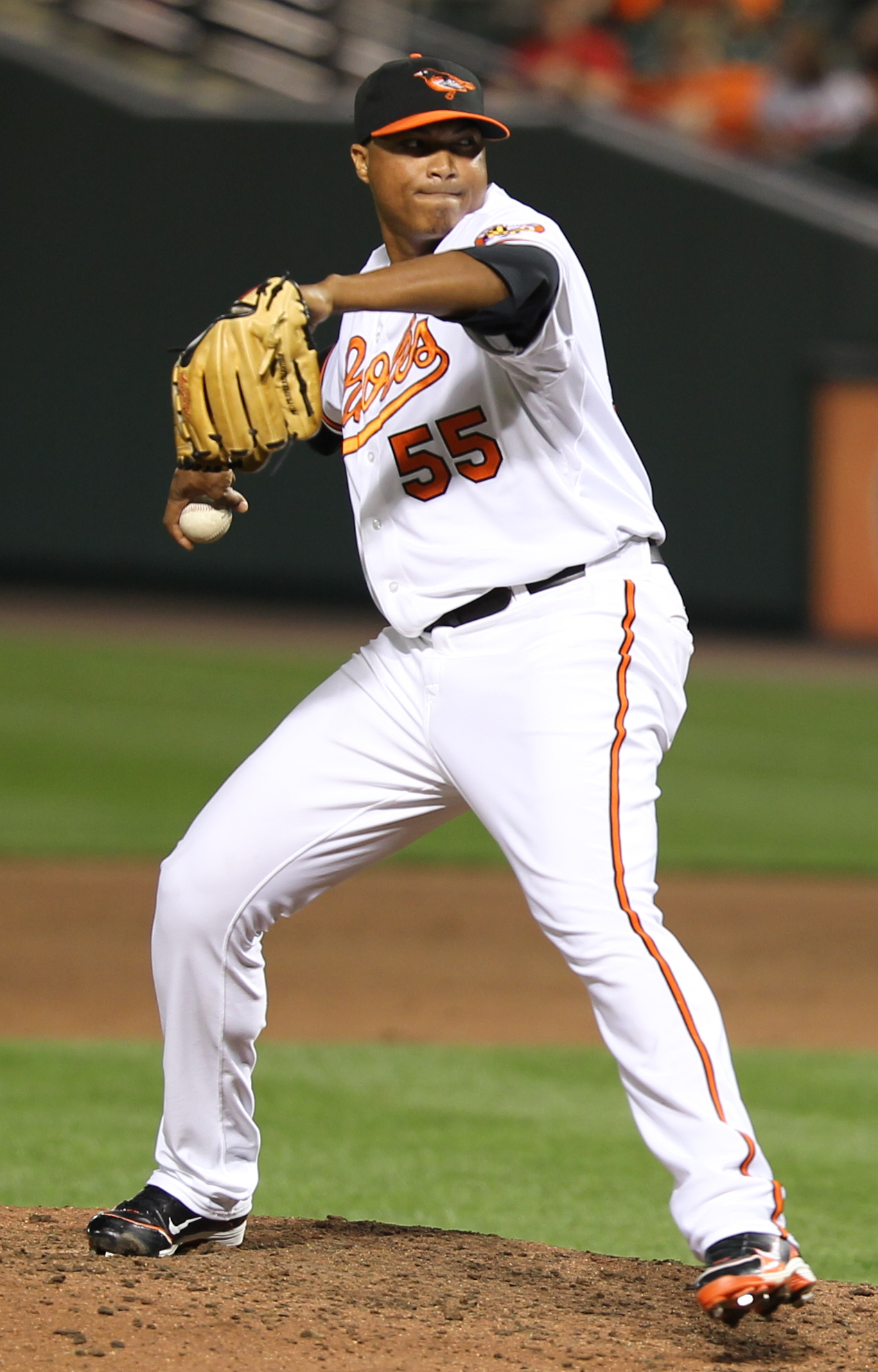 Alfredo Simón